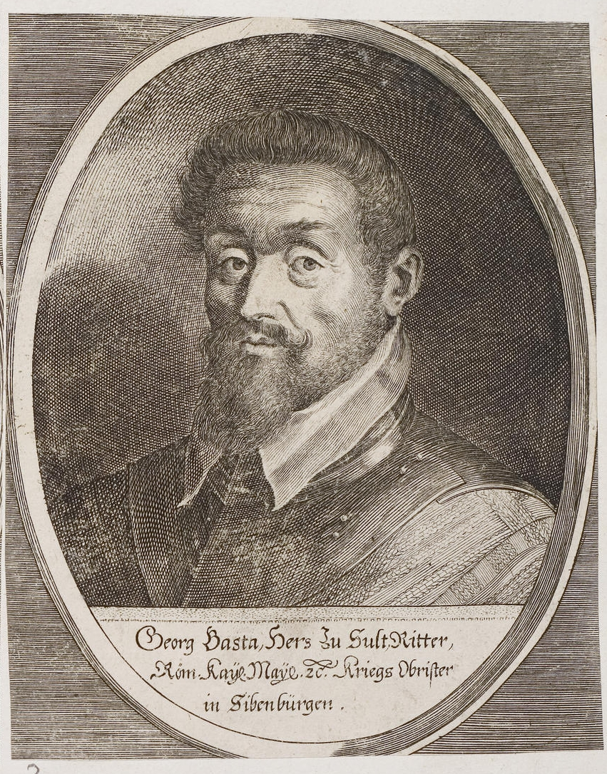 Grafik aus dem Klebeband Nr. 2 der Fürstlich Waldeckschen Hofbibliothek Arolsen Motiv: "Georg Basta, Herr zu Sult, Ritter Röm. Kayl. May. etc. Kriegs Obrister in Sibenbürgen" (Giorgio Basta, Freiherr von Sult)